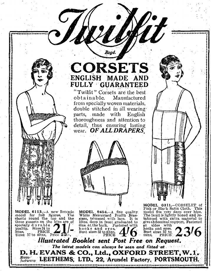 Reklam för "Twilfit" corsetter